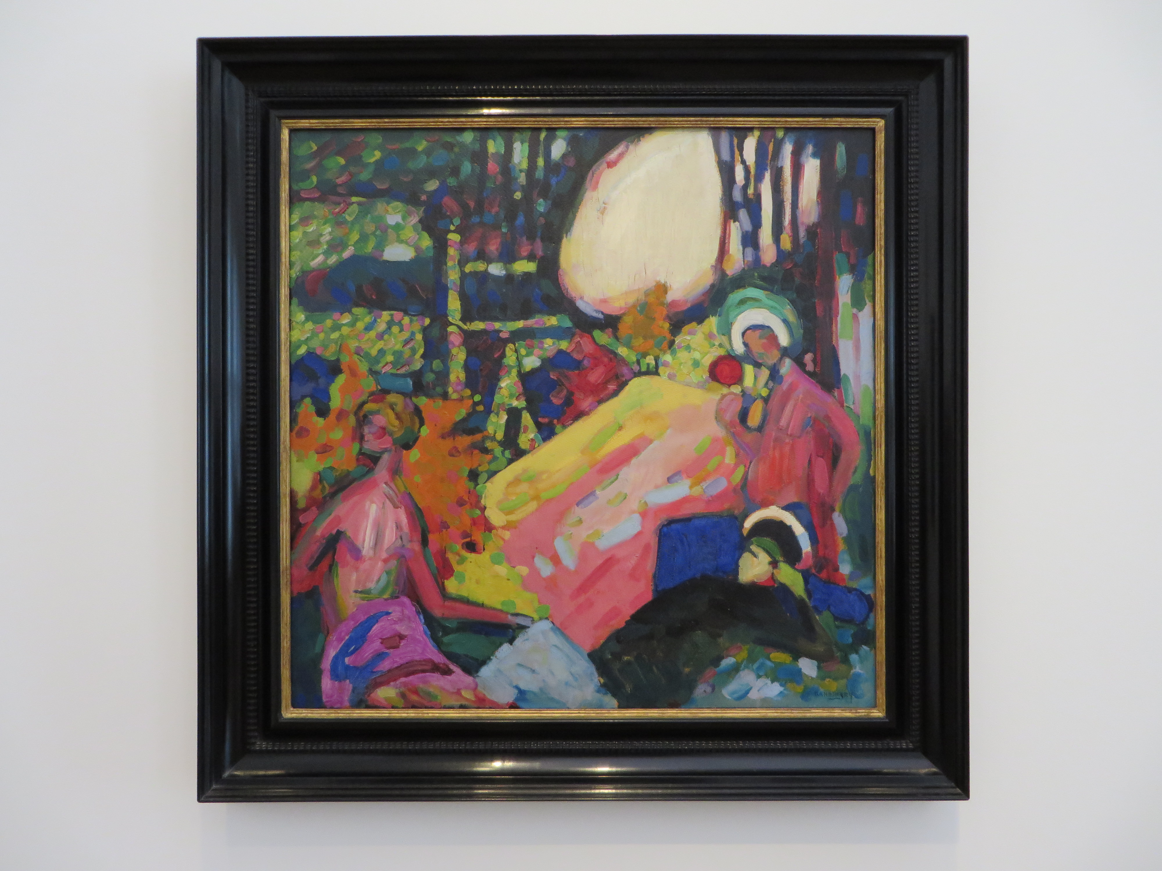 eines von acht Gemälden, die Kandinsky 1908 nach dem Besuch eines Vortrags Rudolf Steiners in Berlin zu Goethes Farbenlehre fertigte